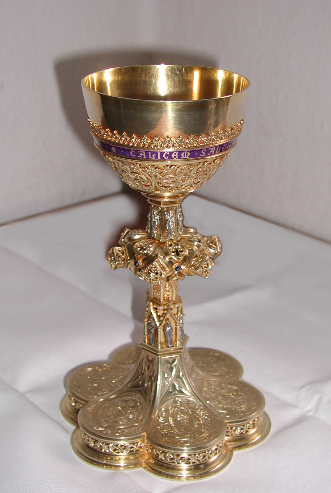 Der Kelch aus der Kirche Zum Guten Hirten in Berlin-Friedrichsfelde, 1920 (lt. Bildunterschrift im Art. "Kelch (Liturgie)"